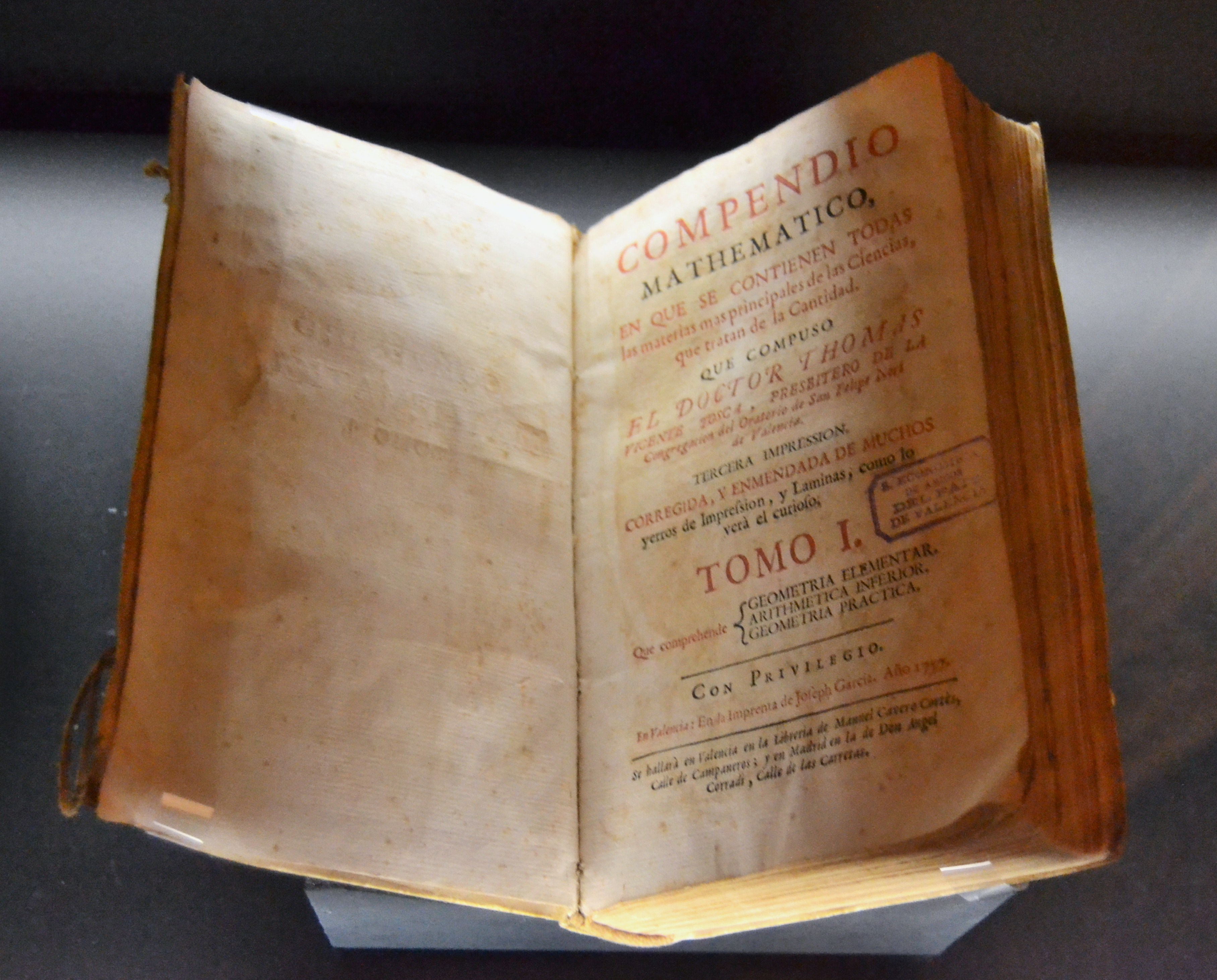 Compendio mathematico... de Tomàs Vicent Tosca, imprenta de Joseph Garcia, RSEAP, museu d'Història de València.u